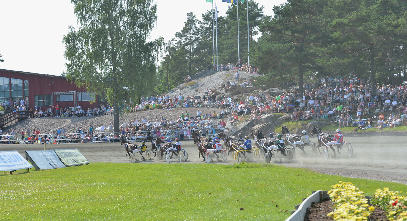 Årjängstravet